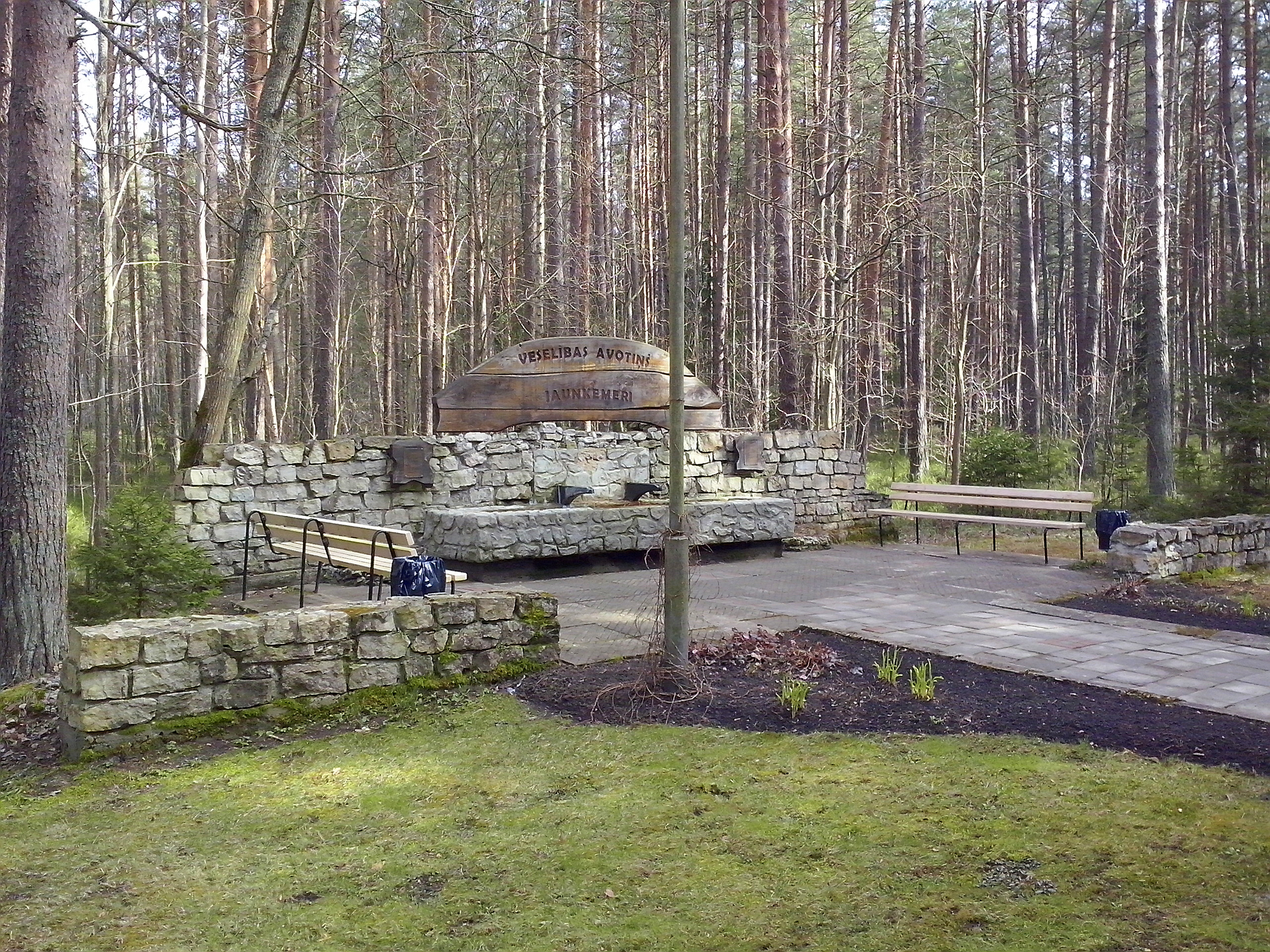 Jaunķemeru "Veselības avotiņš". "Health spring" at Jaunķemeri. April, 2016